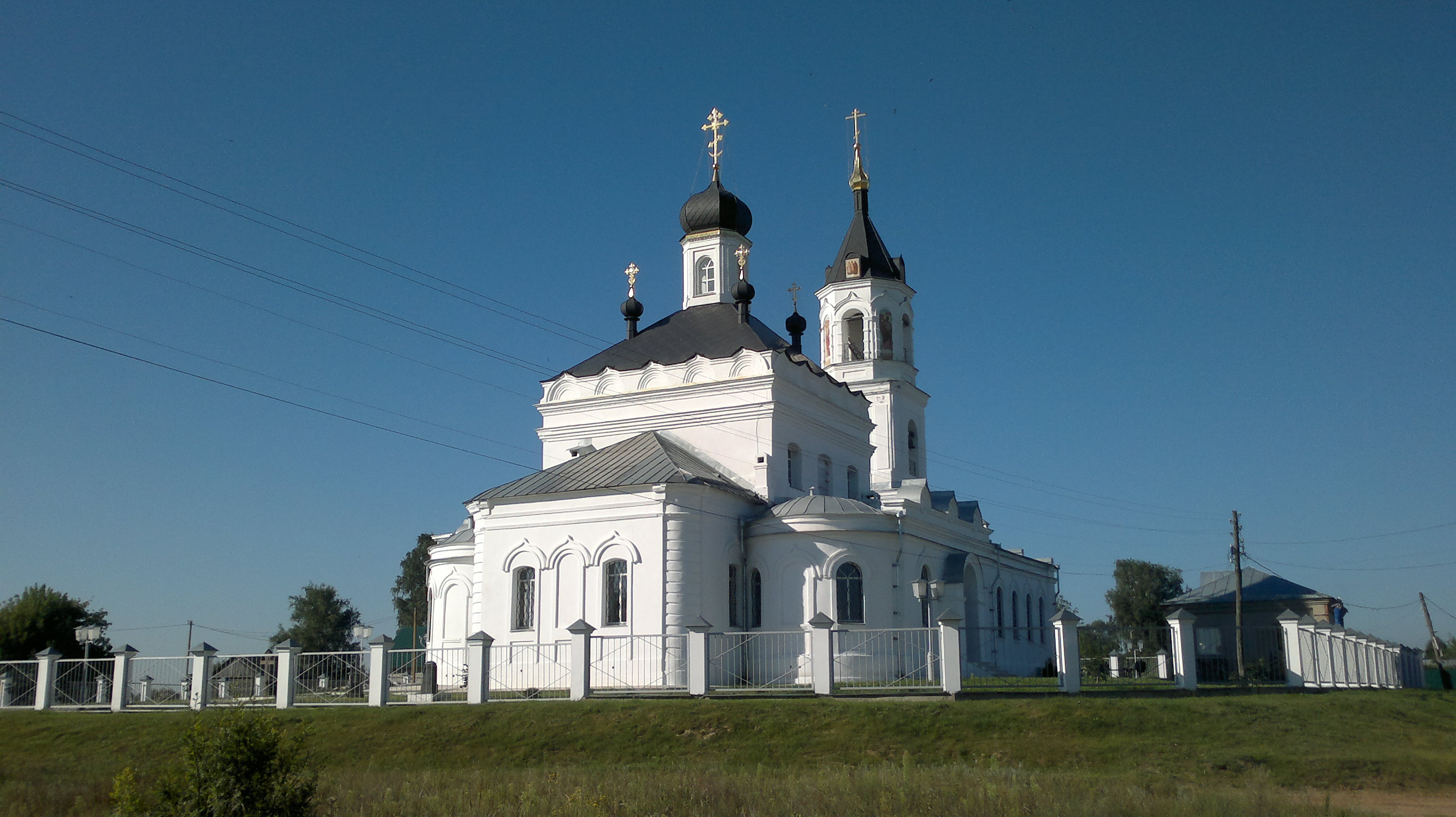 Никольская церковь: Юшта, Шиловский район, Рязанская область